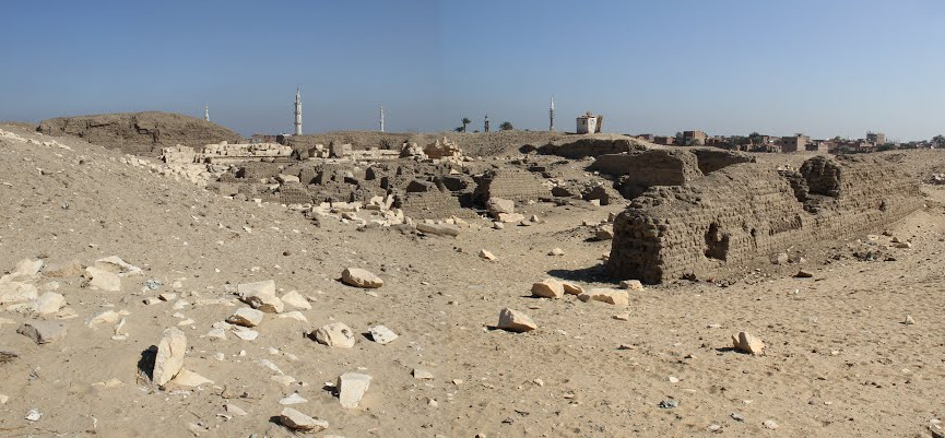 Le Kôm es-Sultan à Abydos (Egypte).